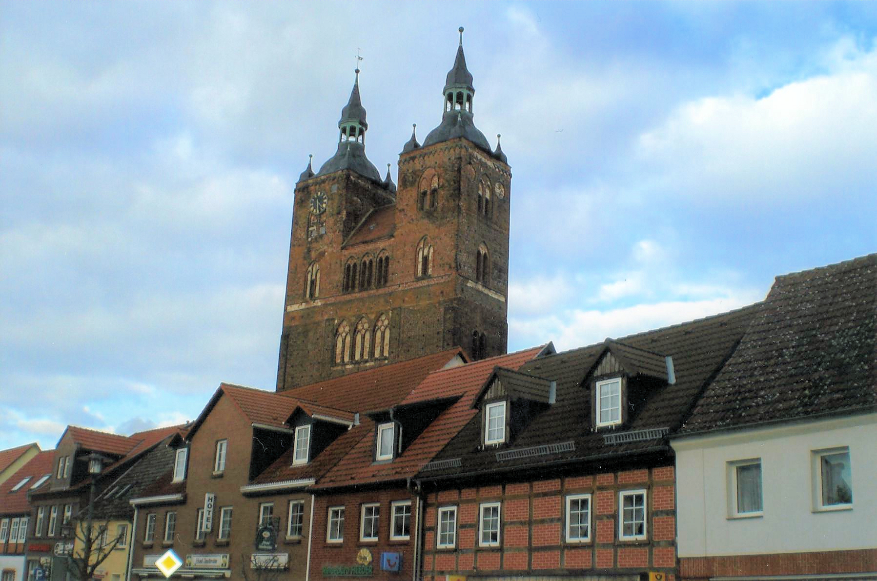 Stadtkirche St. Peter und Paul in Seehausen